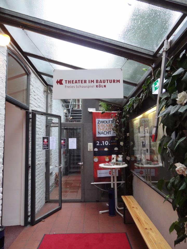 Eingangsbereich zum Foyer des Theater im Bauturm in Köln am 2. Oktober 2012